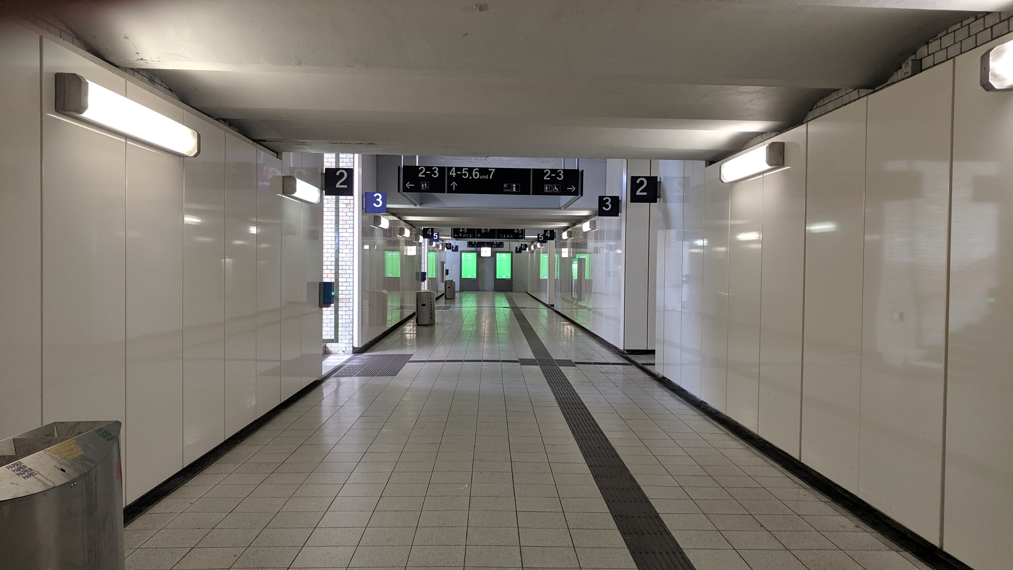 Bahnhof Herford, Fußgängerunterführung zu den Gleisen, Taken on 1 June 2019